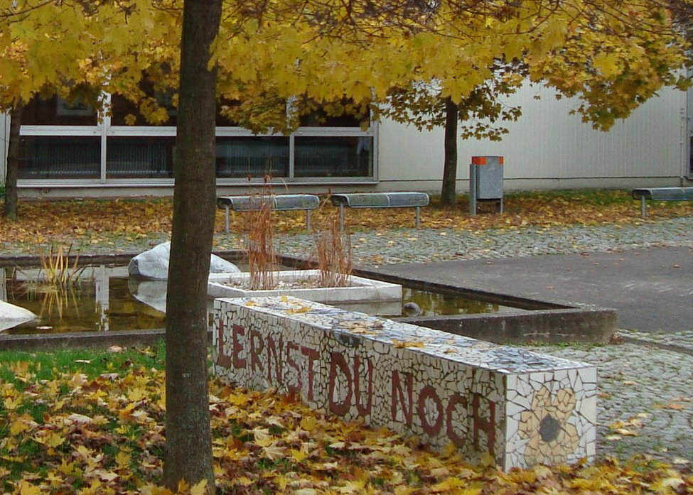 Innenhof